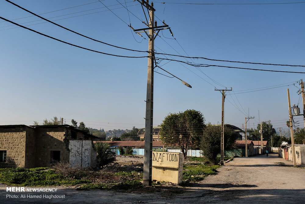 مسجد سلیمان